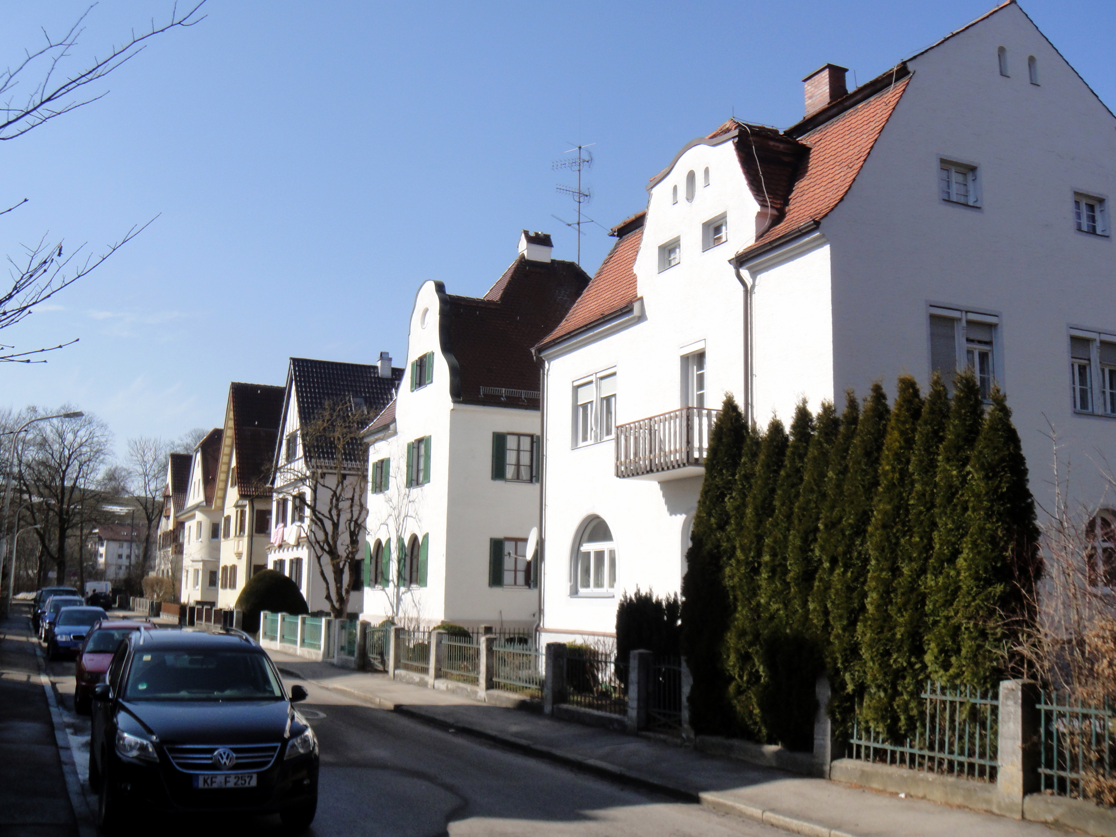 Ensemble Schäferstraße Der 1904 angelegte Straßenzug südlich der Altstadt ist mit einheitlichen, zwischen 1904 und dem Ersten Weltkrieg entstandenen Wohnhäusern in offener Bauweise bebaut. Es handelt sich um zweigeschossige, villenartige Bauten, in der Regel mit hohen Sattel- oder Krüppelwalmdächern, giebelständig zur Straße; vereinzelt treten Schweifgiebel und Zwerchhäuser auf. Die Wandgliederungen weisen Formen der Neurenaissance, des Neubarock und des Heimatstils auf, sie sind in neuerer Zeit teilweise vereinfacht worden; die Bauten sind von Vorgärten umgeben. Der Neubau Nummer 11 nimmt keine Rücksicht uaf das besondere Gepräge des Ensembles E-7-62-000-3